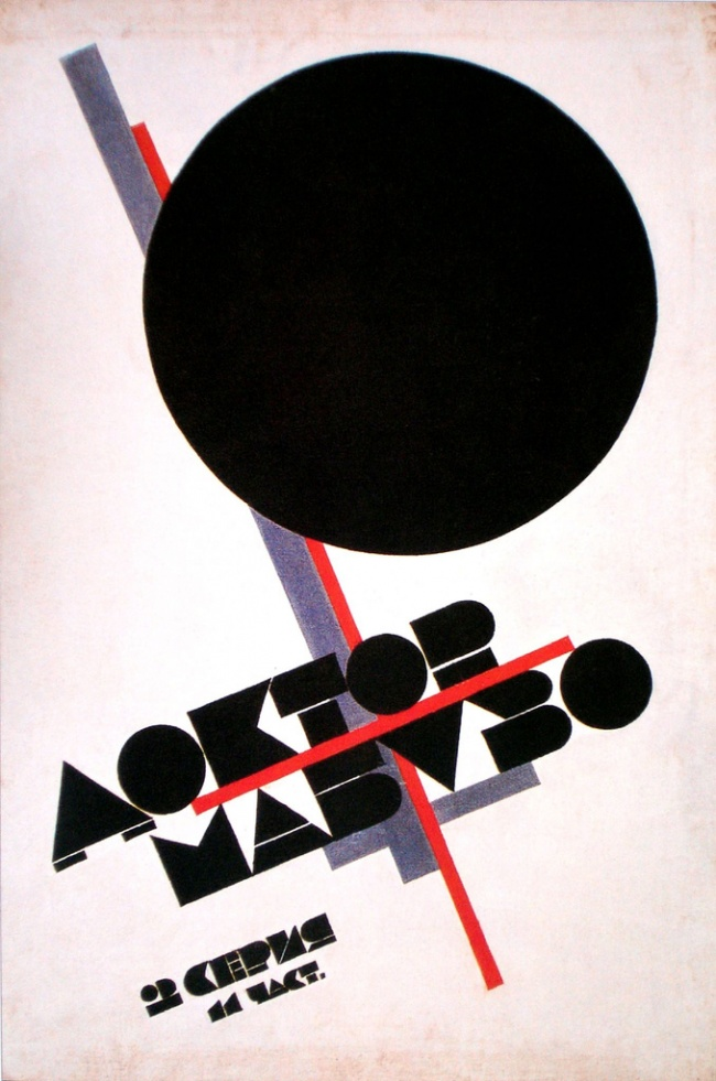 Афиша Казимира Малевича к фильму Фрица Ланга «Доктор Мабузо»